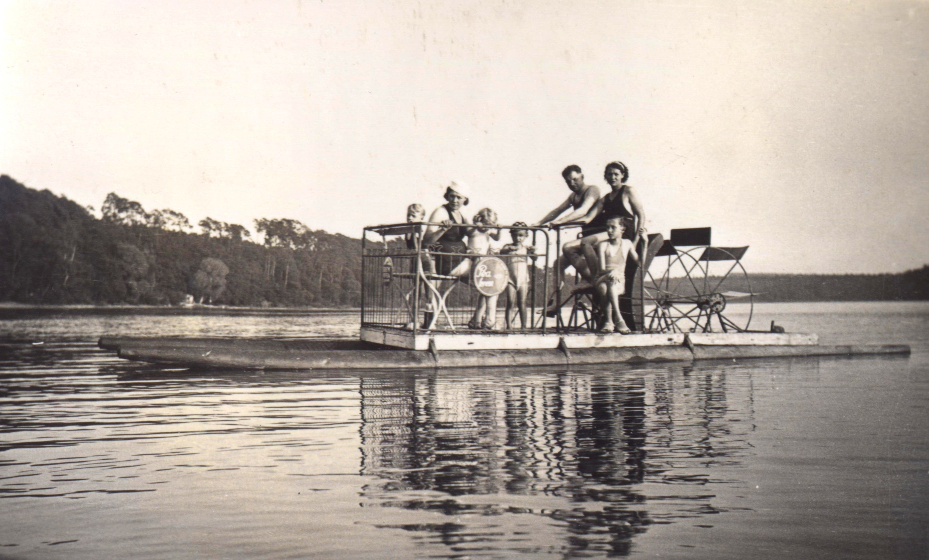 Pédalo à Puszczykowo